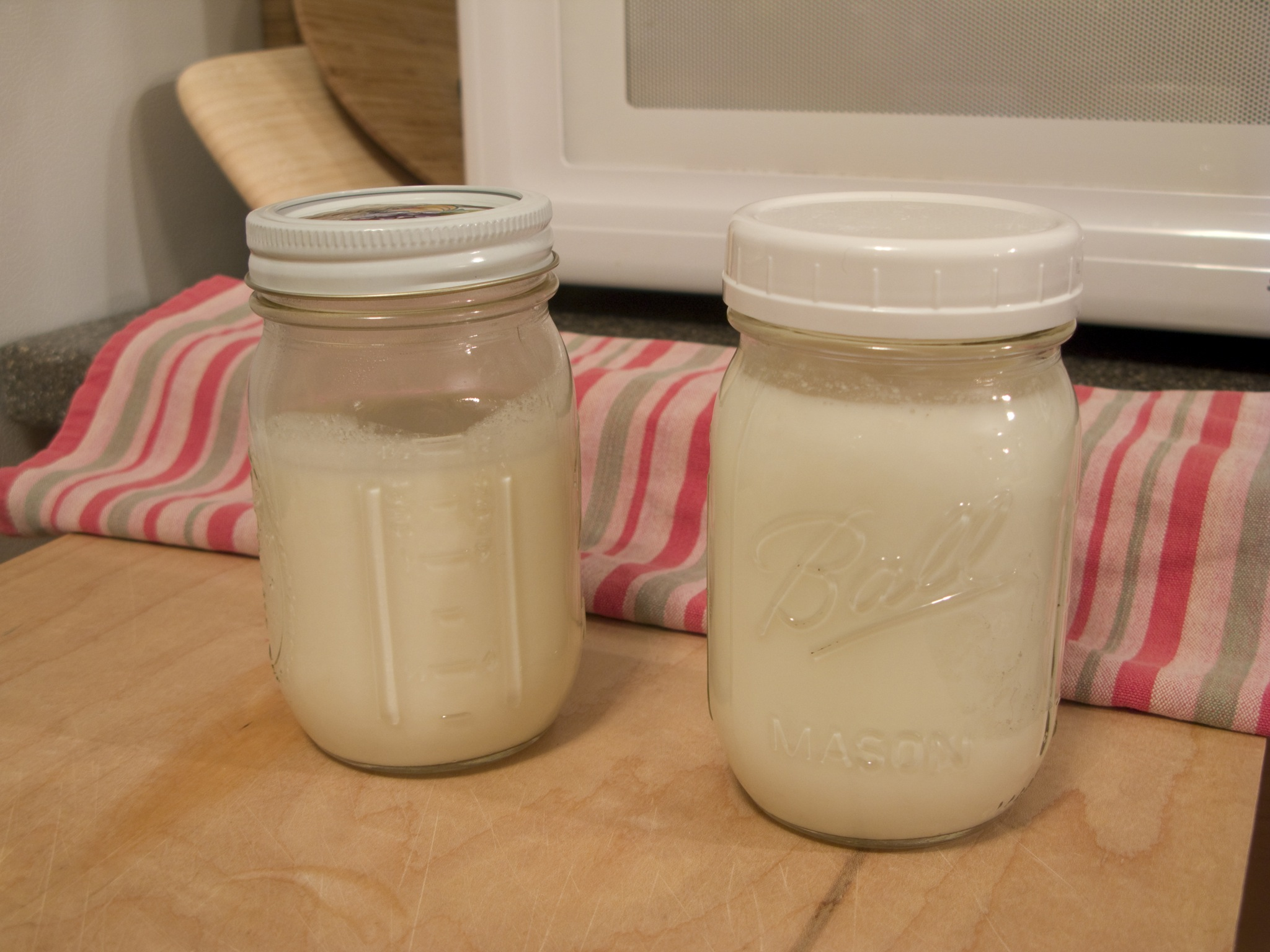 El procediment consisteix en deixar reposar la llet amb els grans de kefir en un recipient net, durant 24 hores aproximadament (temps que triguen els microorganismes en fer la fermentació làctica) i a temperatura ambient.